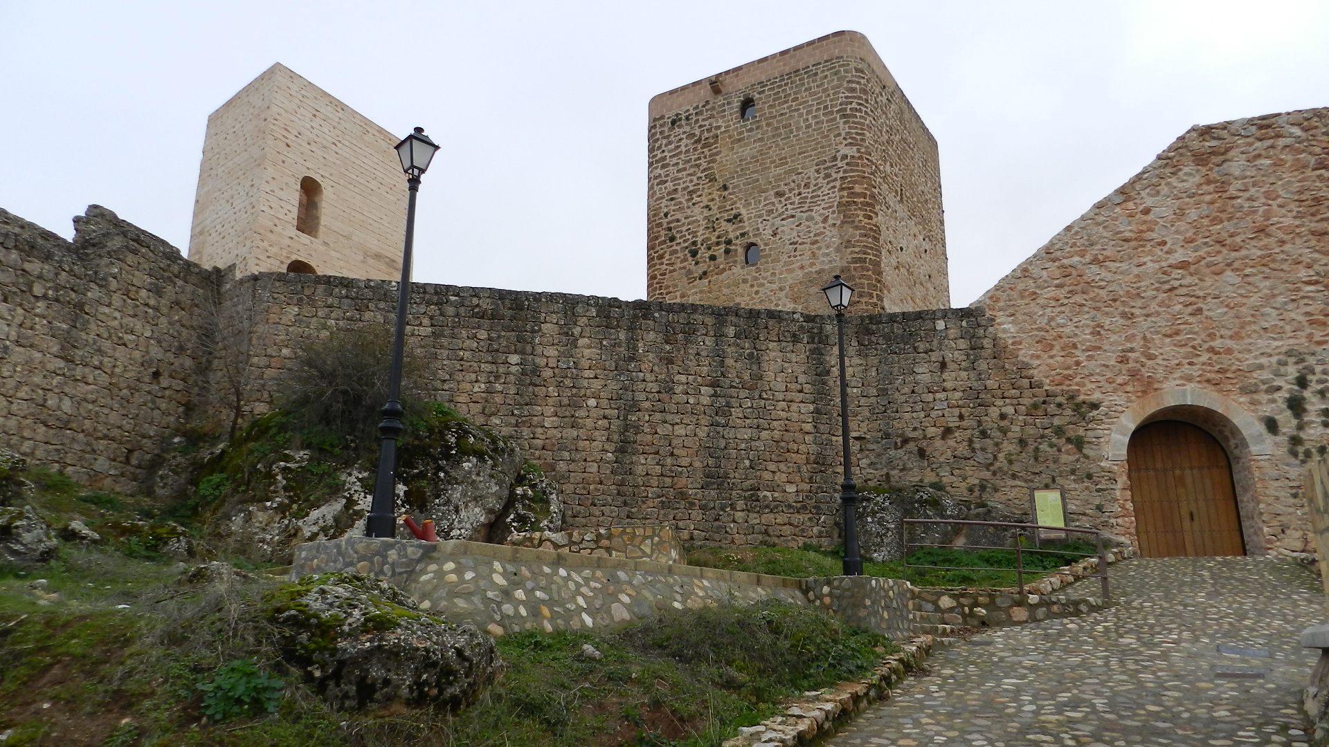 Castillo restaurado de Hornos de Segura